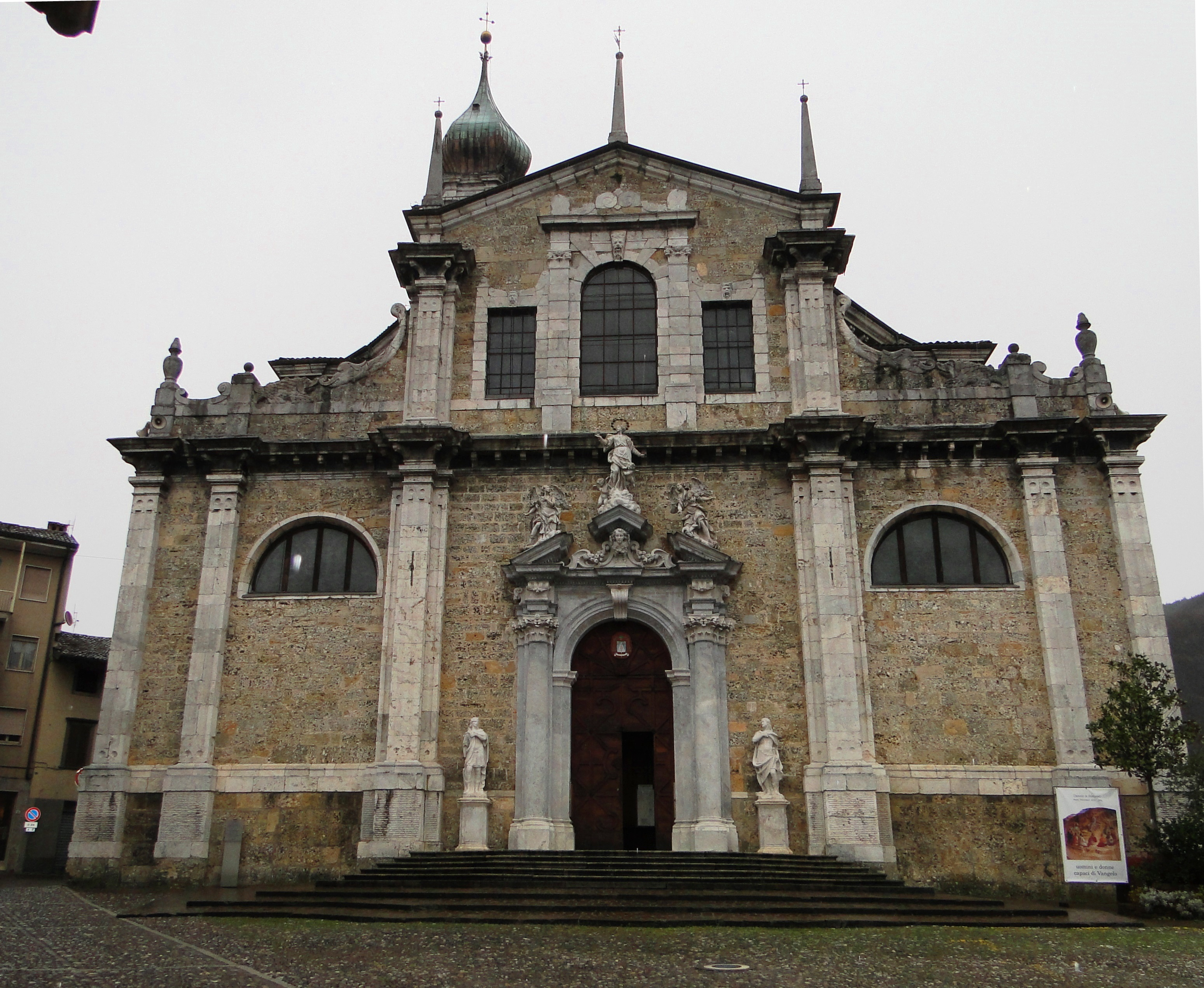 Gandino (BG). Basilica di santa Maria Assunta. Facciata